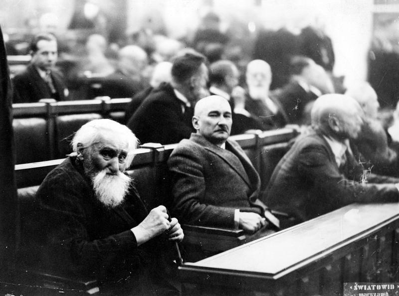 Bolesław Limanowski in Senat